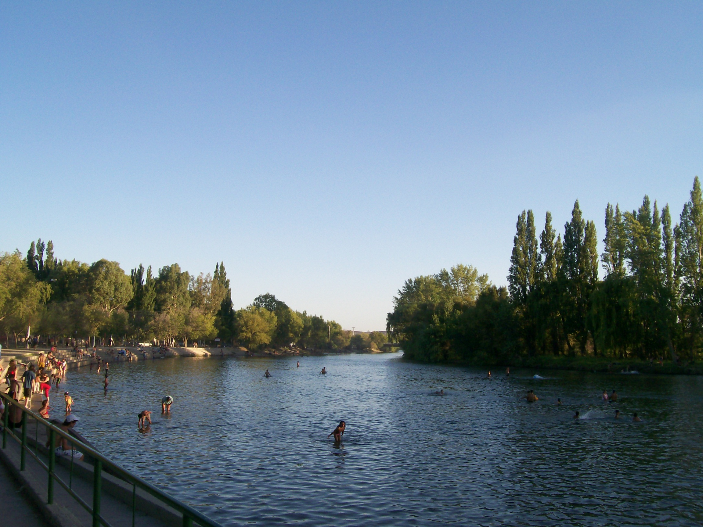 Balneario en el Río Limay, ciudad de Neuquén.